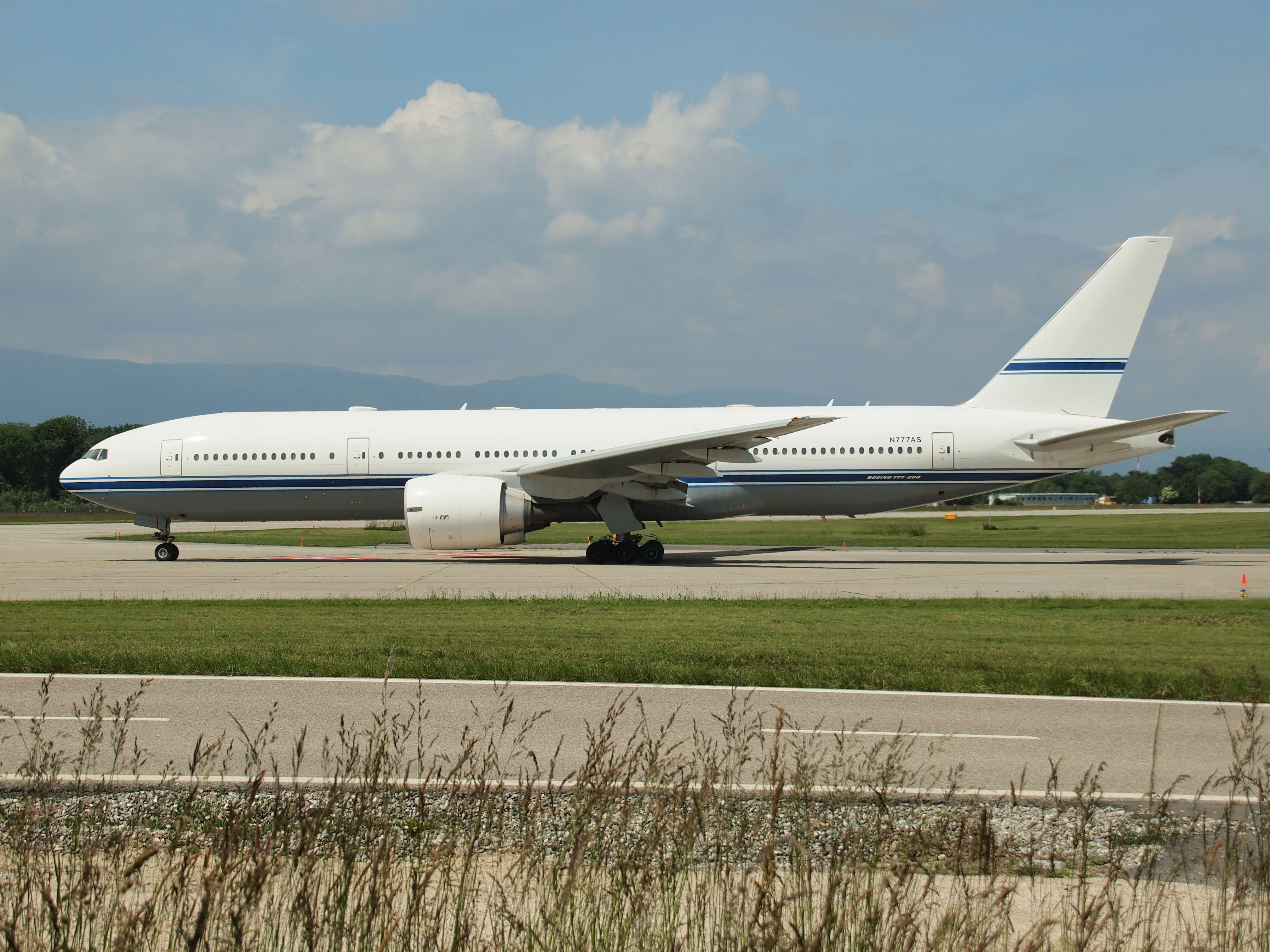 GVA 12.06.2013